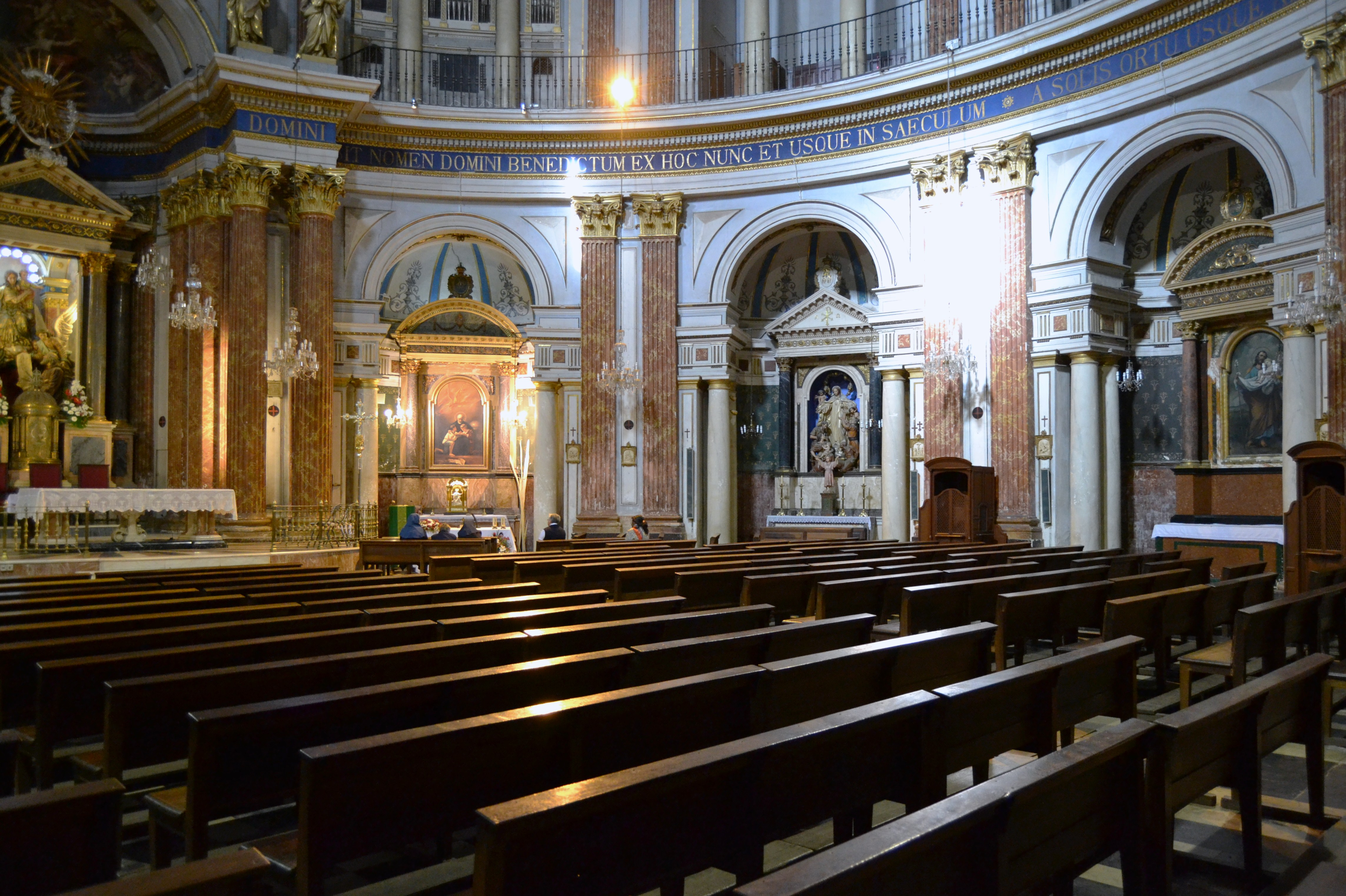 València, interior de l'església de les escoles Pies.